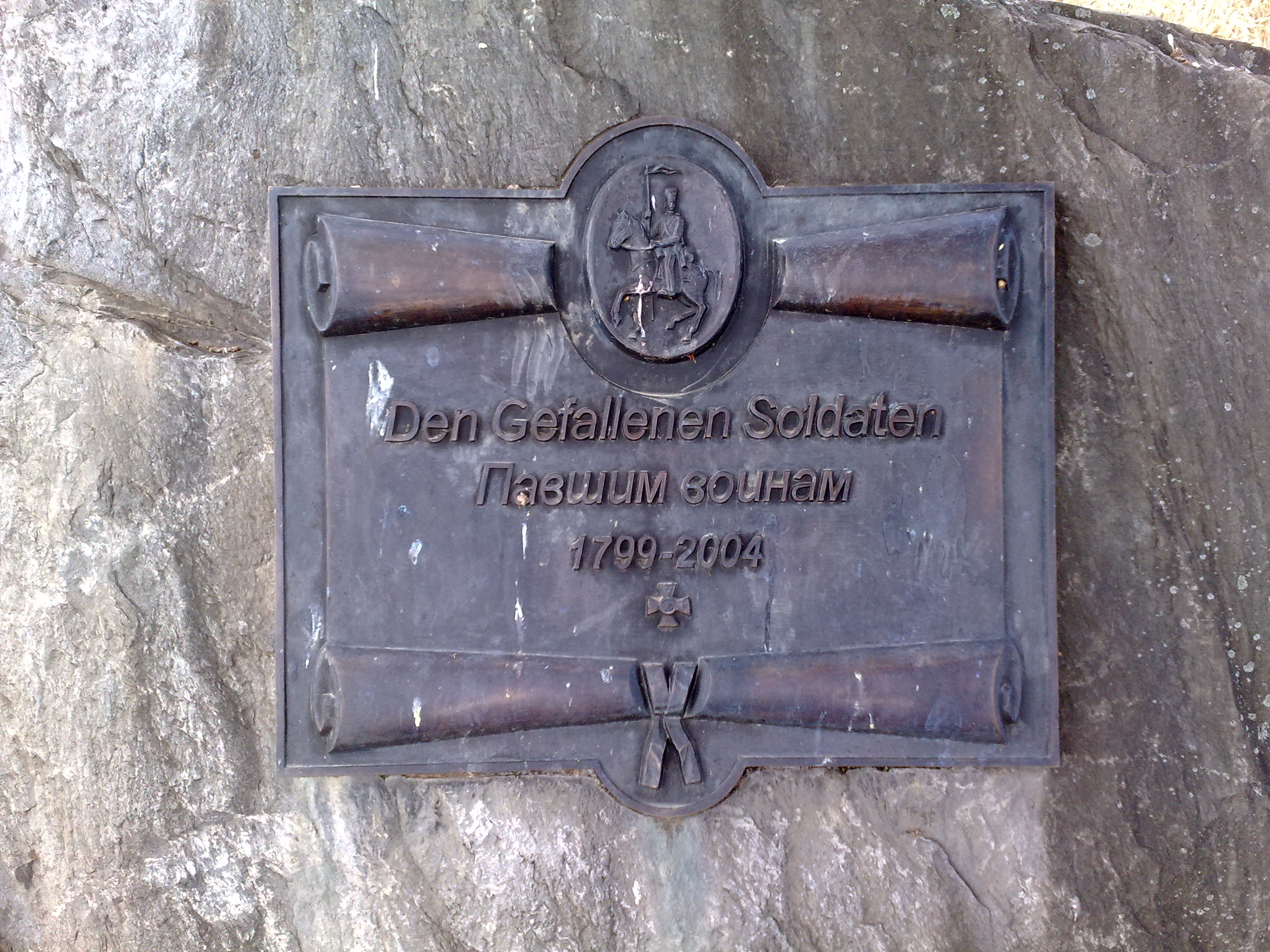 Russendenkmal Unterengstringen